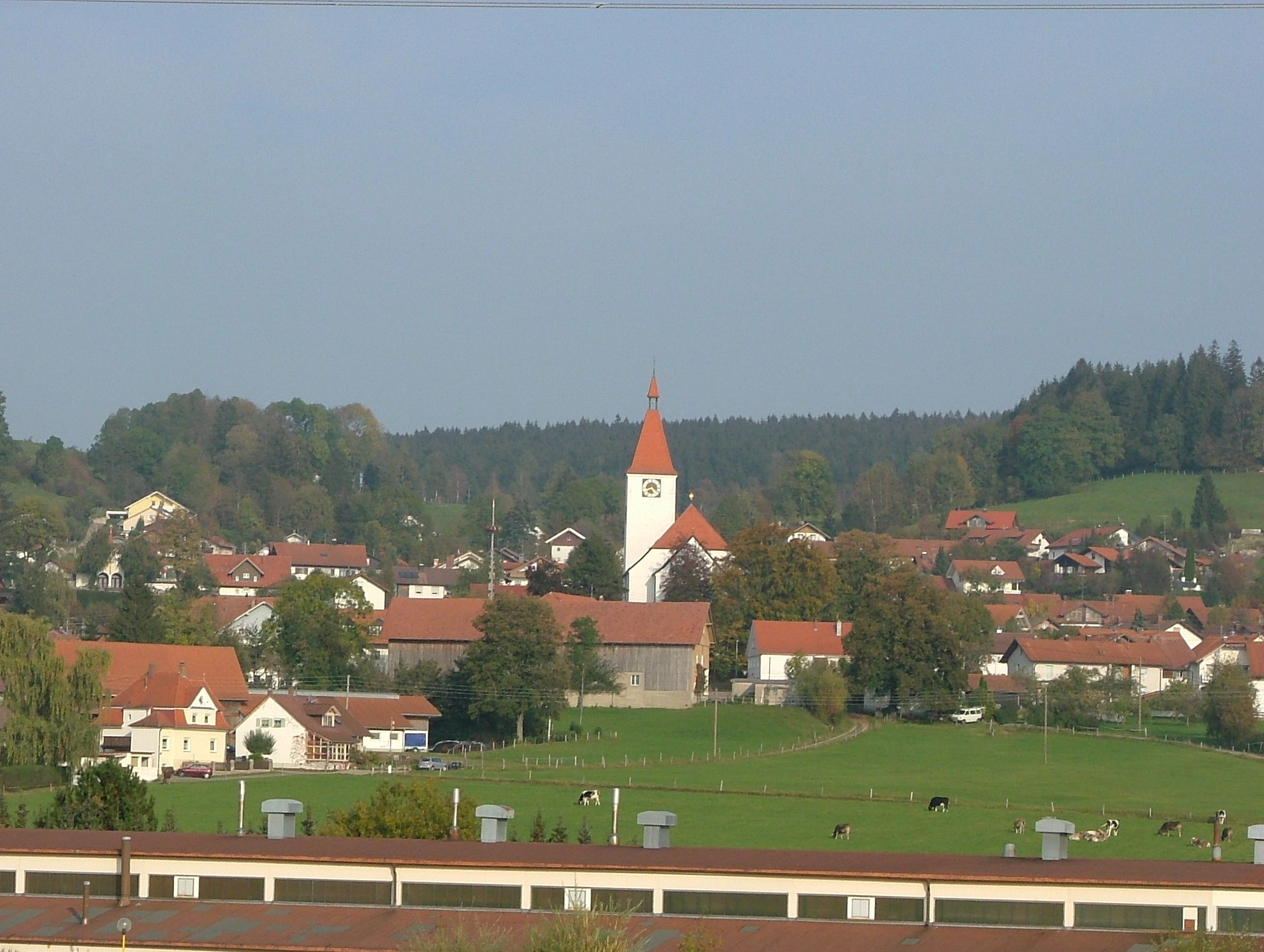 Haldenwang